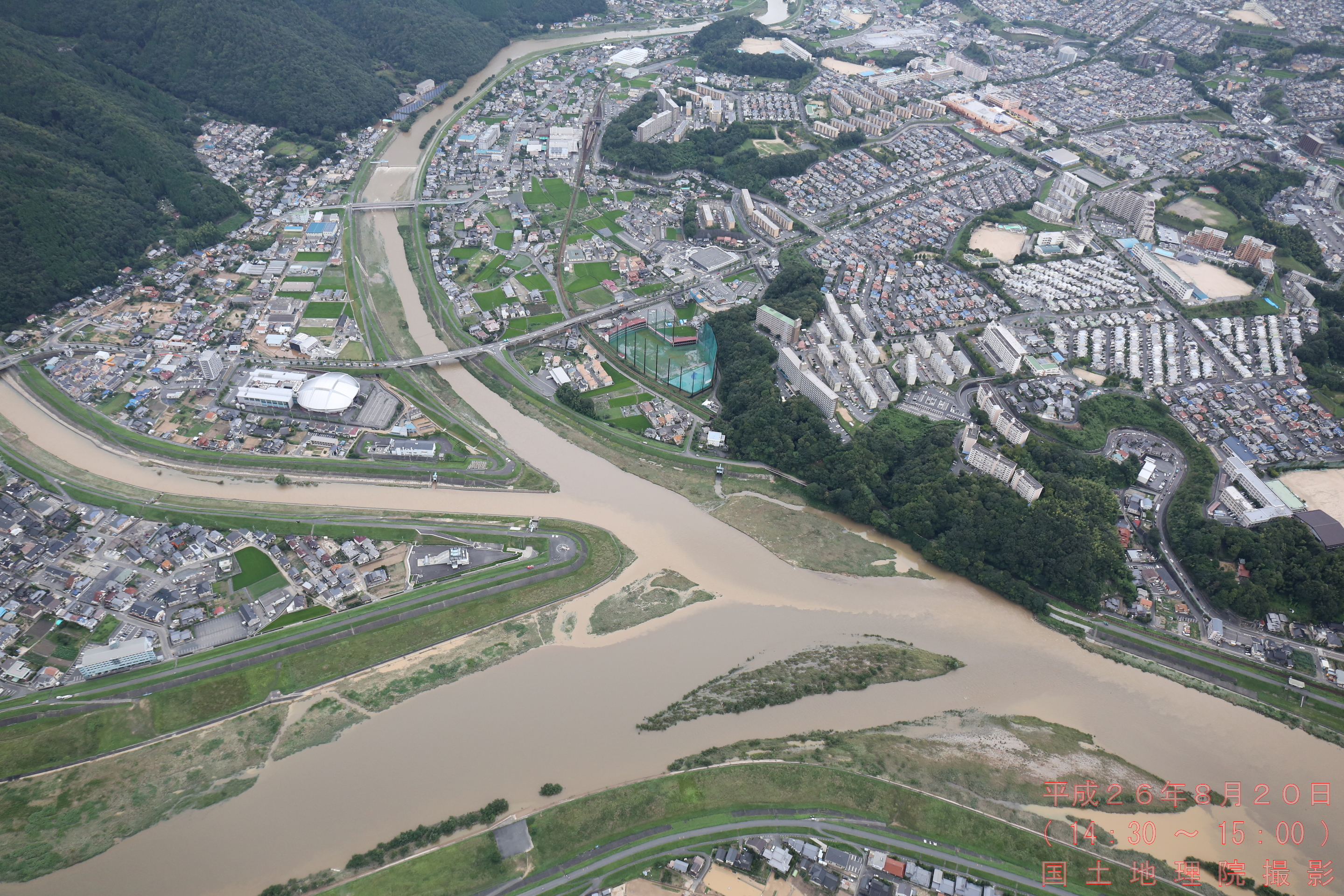 平成26年8月豪雨による広島市の土砂災害